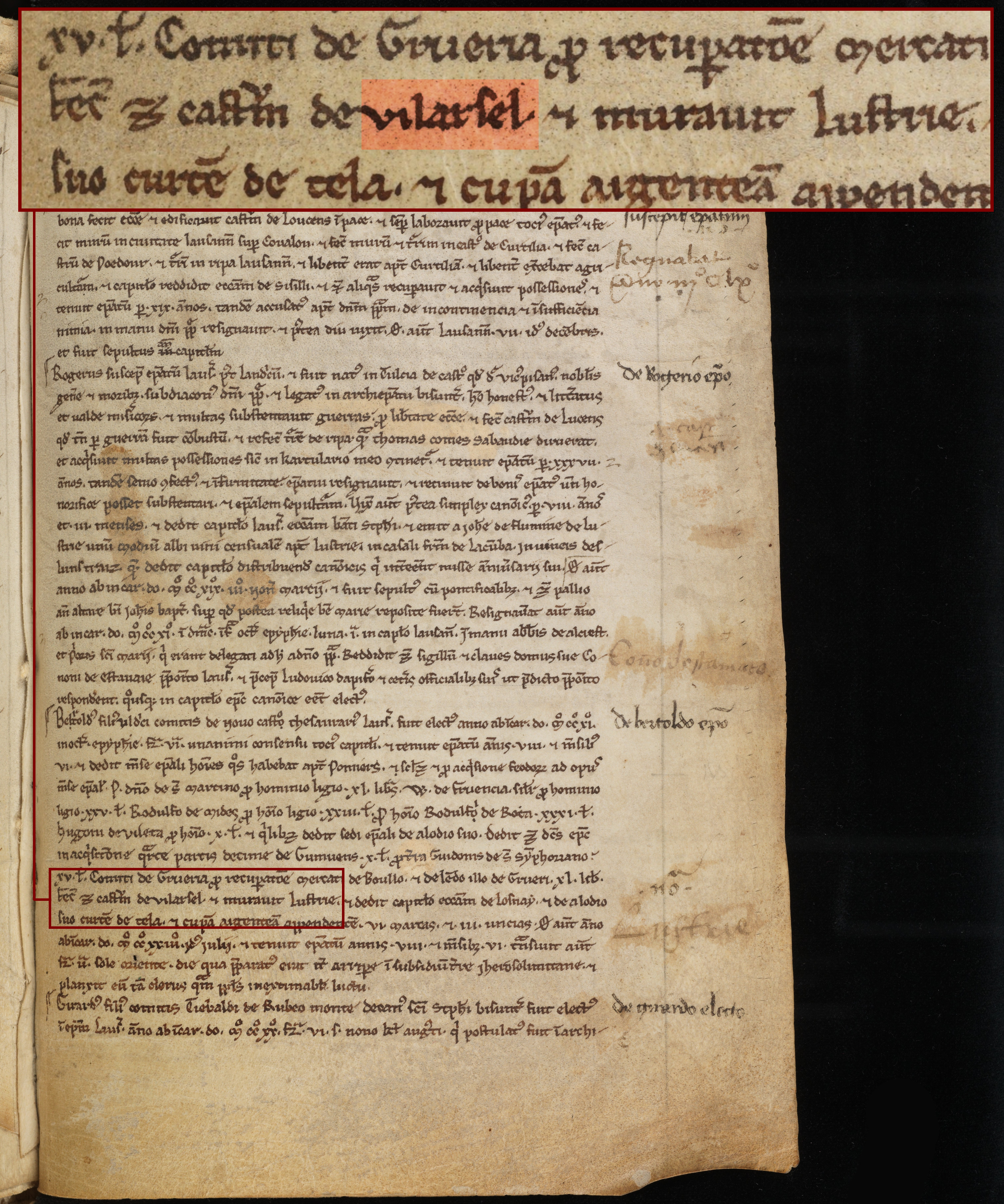 Mention d'un Château à Vilarsel fondé sur ordre de Berthold de Neuchâtel dans le Cartularium Lausannense, Berne, Burgerbibliothek, Cod. B 219, 8r